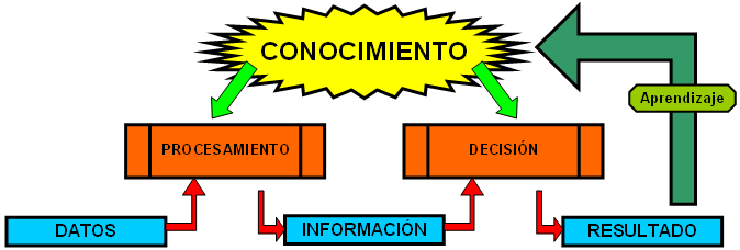 Esquema sobre generación y aplicación de conocimiento al procesamiento de datos y la toma de decisiones